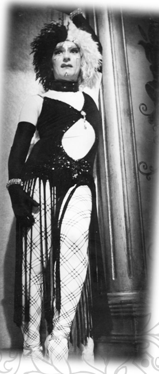 Fred en su personaje de Cruelena